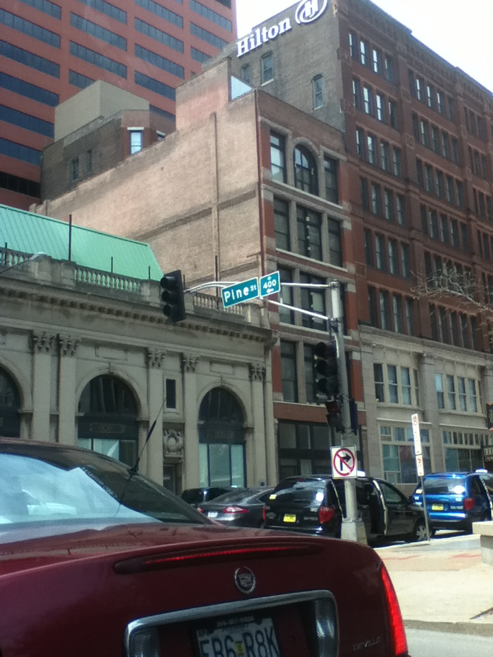 St Louis